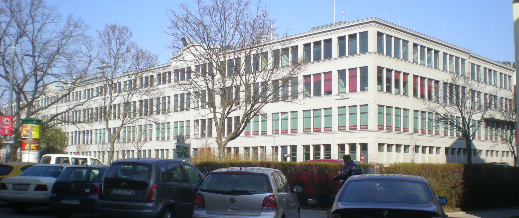 ehemalige Papierfabrik Samum am Kreilplatz in Döbling, heute Q19